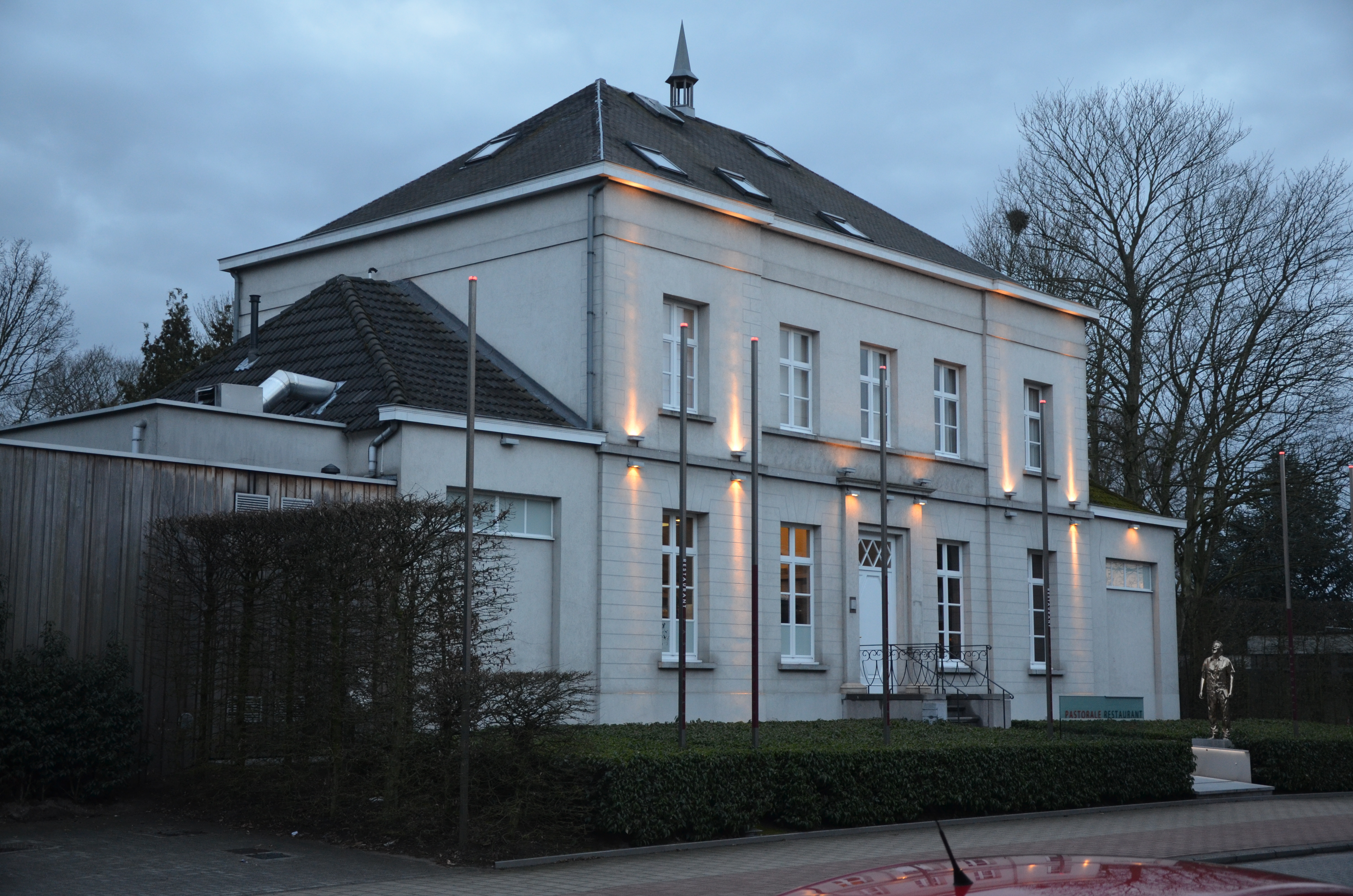 Oude Pastorie, Laarstraat 22, Reet, Beschermd monument, nu restaurant De Pastorale